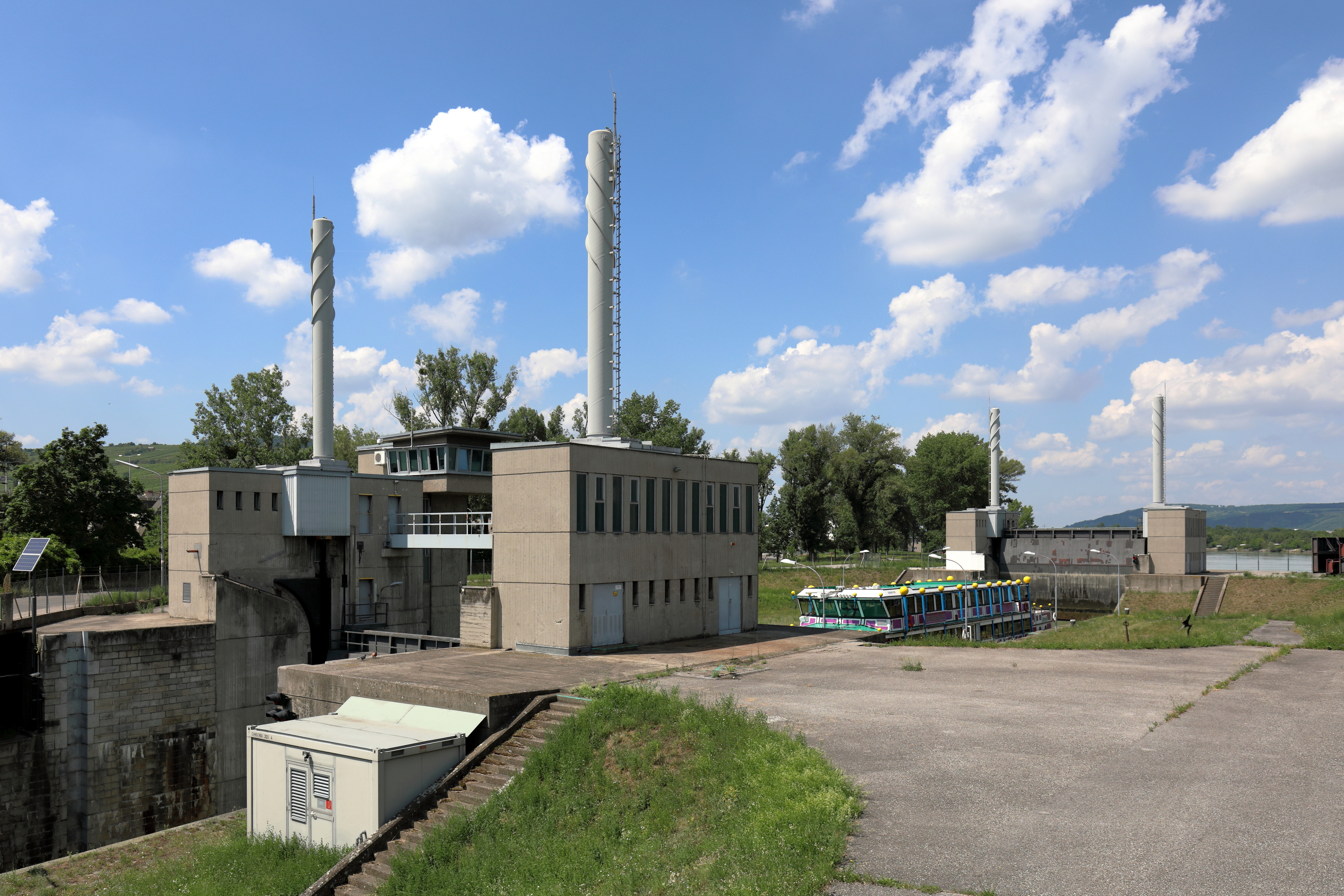 Die Schleuse des Donaukanals, ein Anlagenteil der Nussdorfer Wehr- und Schleusenanlage, im 20. Wiener Gemeindebezirk Brigittenau.Die Schleuse wurde von 1894 bis 1898 errichtet und von 1964 bis 1966 saniert sowie umgebaut.